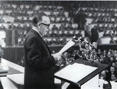 Mariano Rumor al X° Congresso nazionale della DC, a Milano